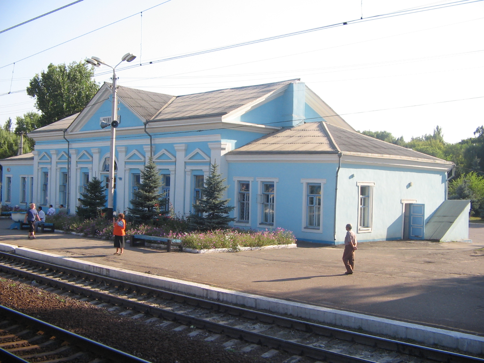 Вокзал города Дружковка